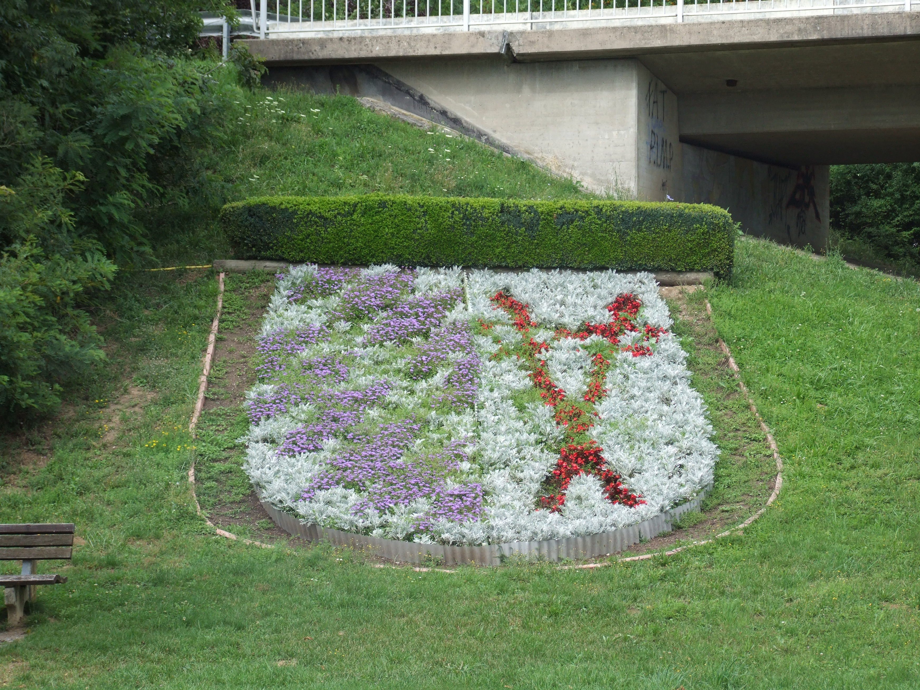 Blumenbeet in Form des Gemeindewappens von Eschelbronn